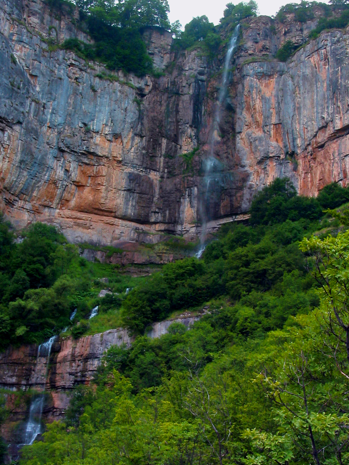 Водопад Скакля